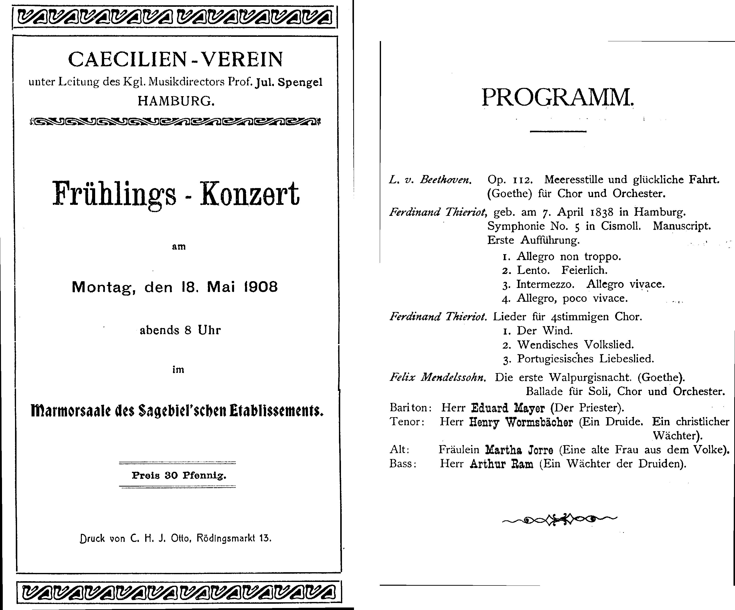 Konzertprogram vom Mai 1908, Uraufführung der Sinfonie cis-moll von Ferd. Thieriot